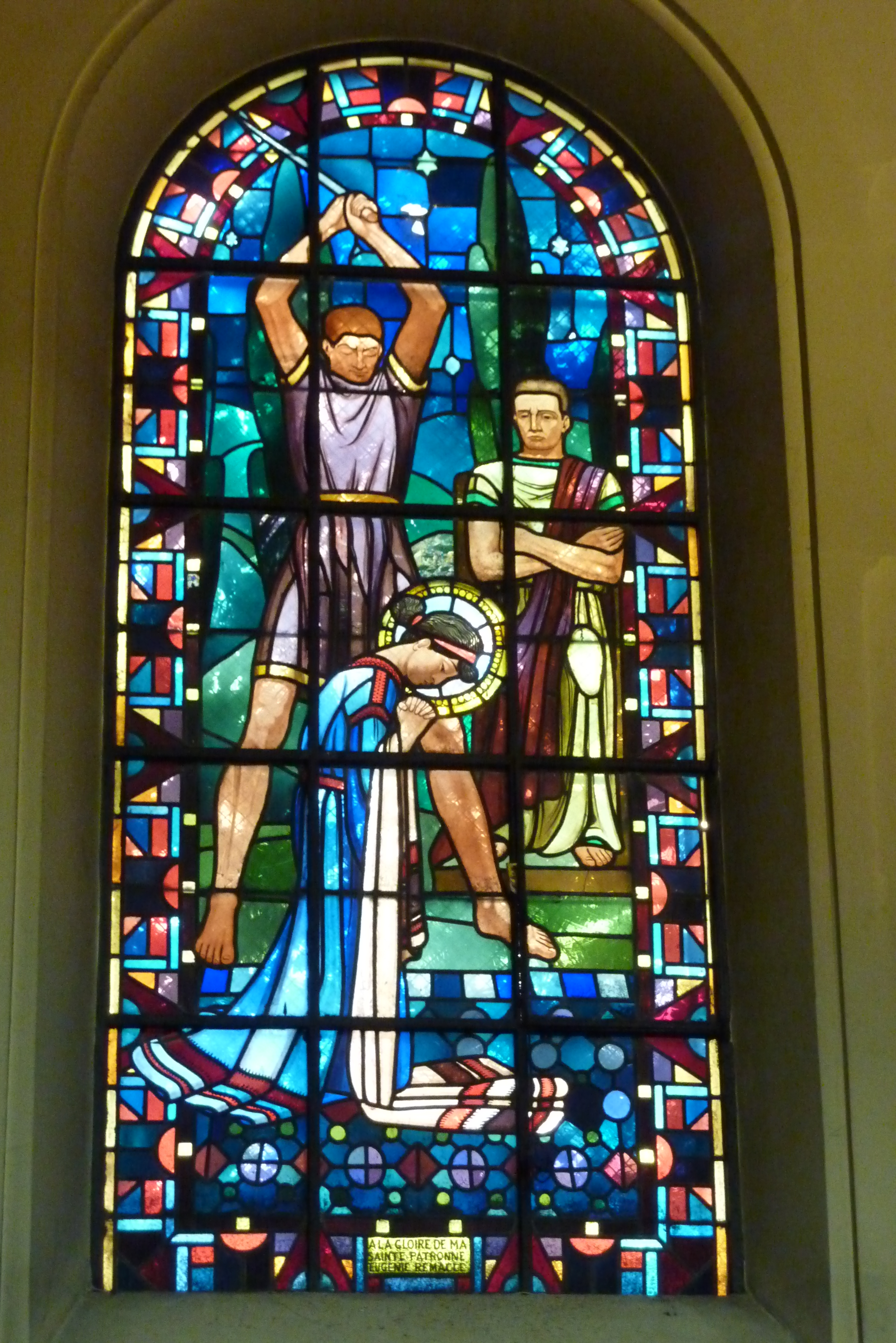 Bleiglasfenster in der Kirche Notre-Dame de Clignancourt im 18. arrondissement von Paris, Darstellung: hl. Eugénie de Rome, Märtyrerin